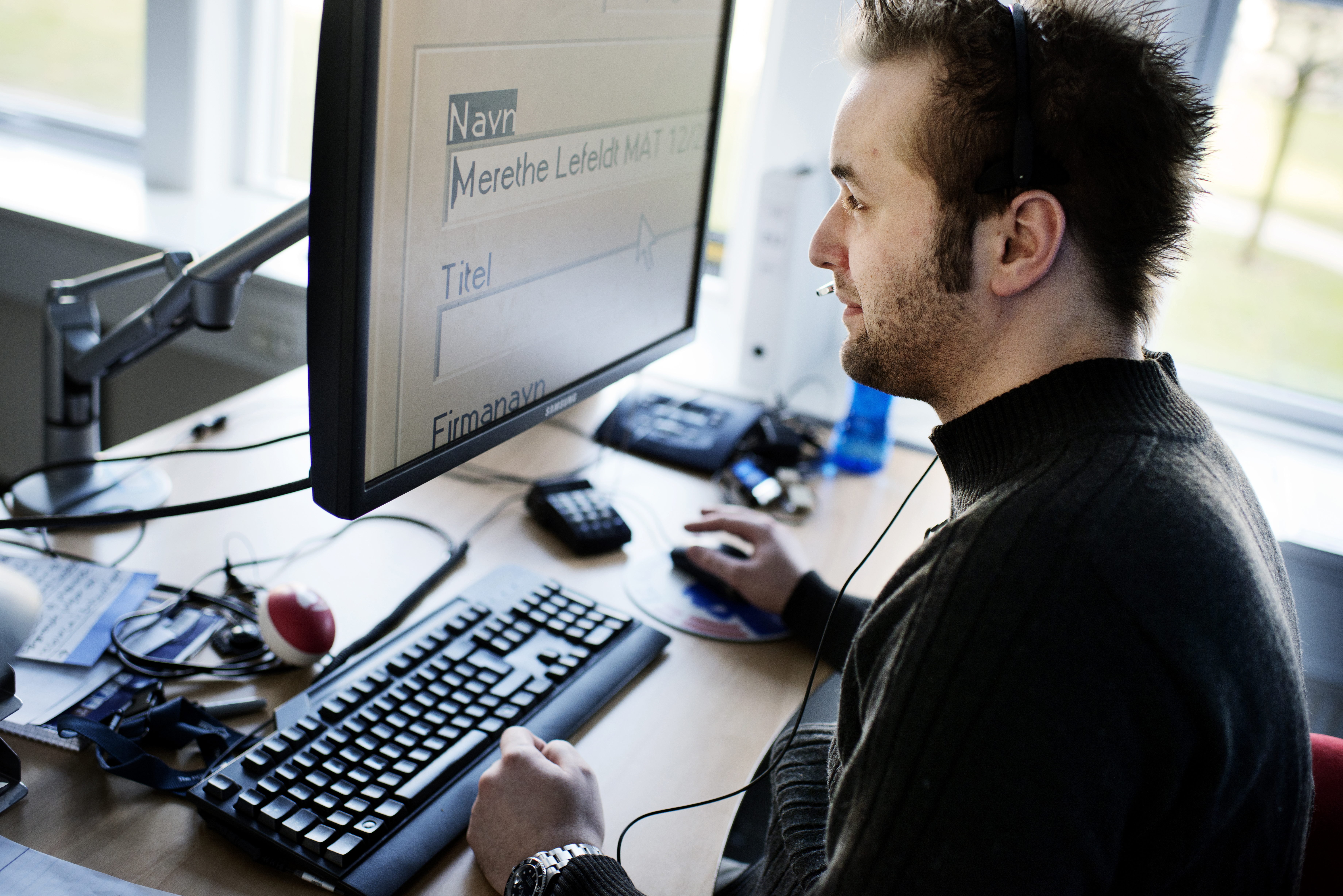 Emil Jokipii-Utzon är synskadad och arbetar med telemarketing vid Telehandelshuset i København. Fotograferad av Anna Wahlgren den 7 mars 2013 Foto: News Øresund – Anna Wahlgren. © News Øresund. Bilden får fritt publiceras under förutsättning att källa anges. Bilden får ej manipuleras. The picture can be used freely under the prerequisite that the source is given. Photo manipulation is not allowed. Originalfil tillhandahålles gratis, kontakta: News Øresund, Malmö, Sweden. News Øresund är en oberoende regional nyhetsbyrå som ingår i projektet Øresund Media Platform som drivs av Øresundsinstituttet i partnerskap med Lunds universitet och Roskilde Universitet och med delfinansiering från EU (Interreg IV A Öresund) och 14 regionala, icke kommersiella aktörer.